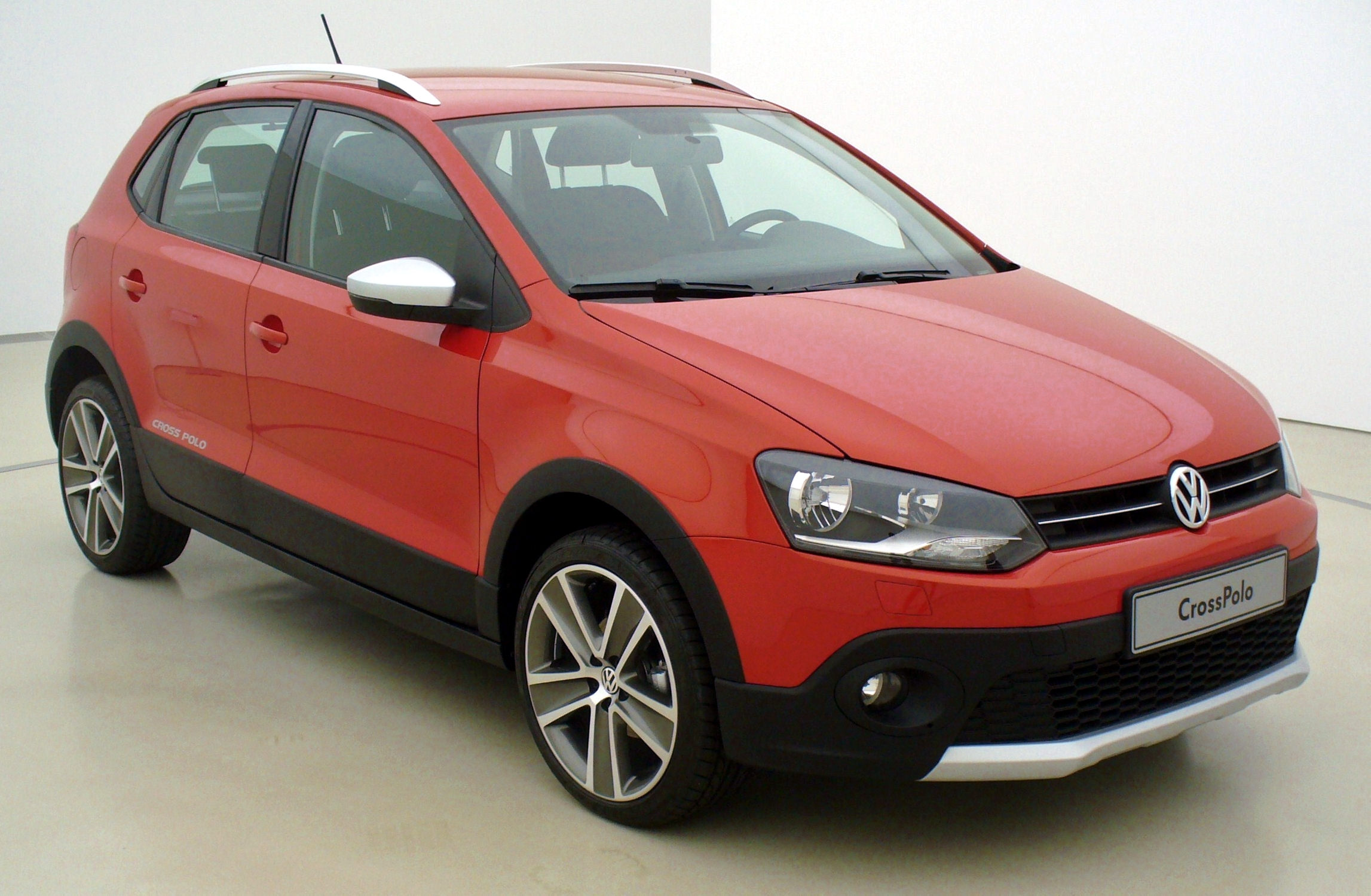 VW CrossPolo V